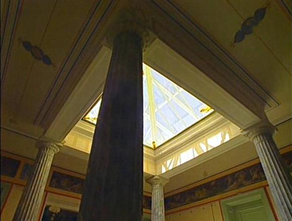 купол